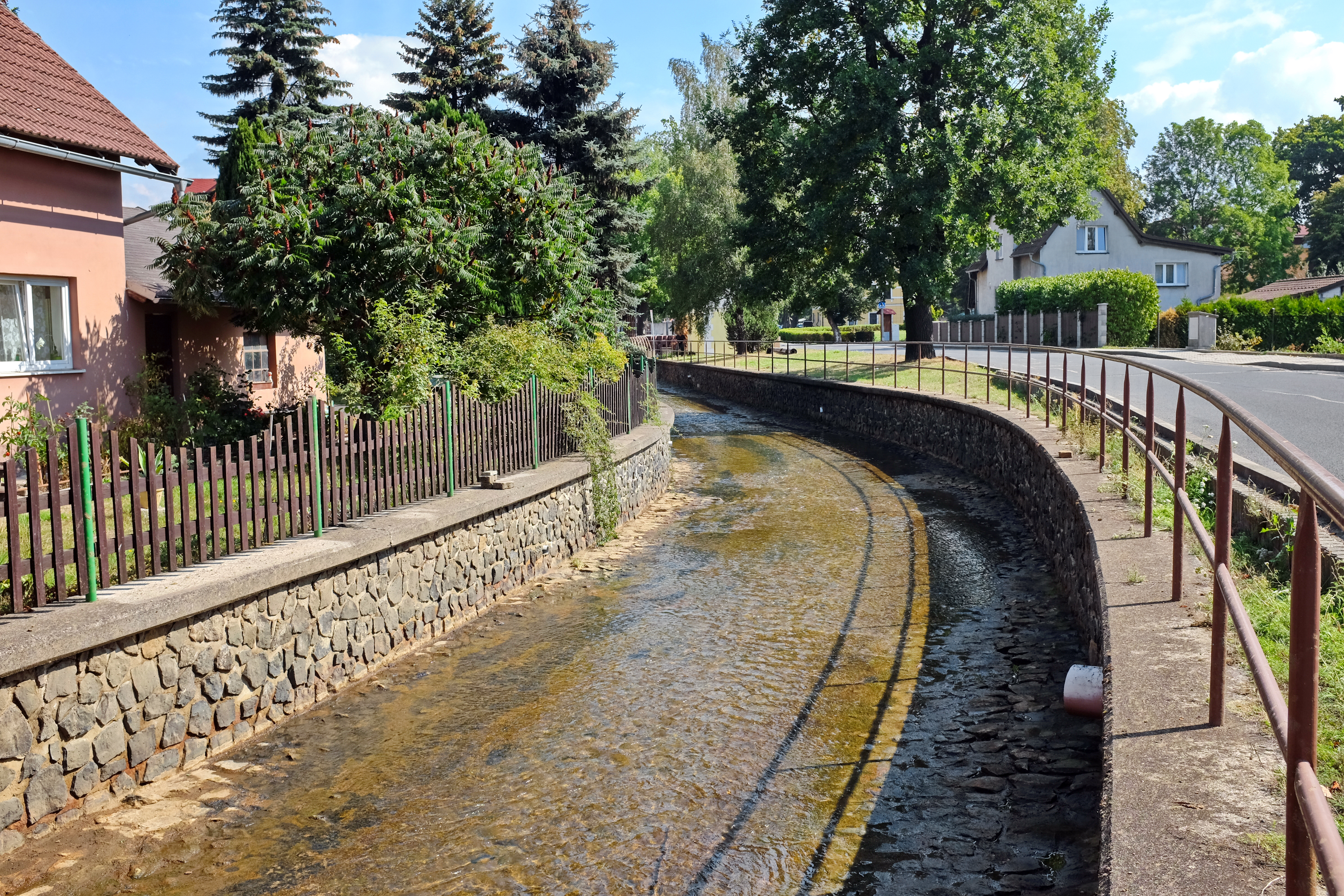 Vintířovský potok, přítok Chodovského potoka, ve Vintířově, okres Sokolov